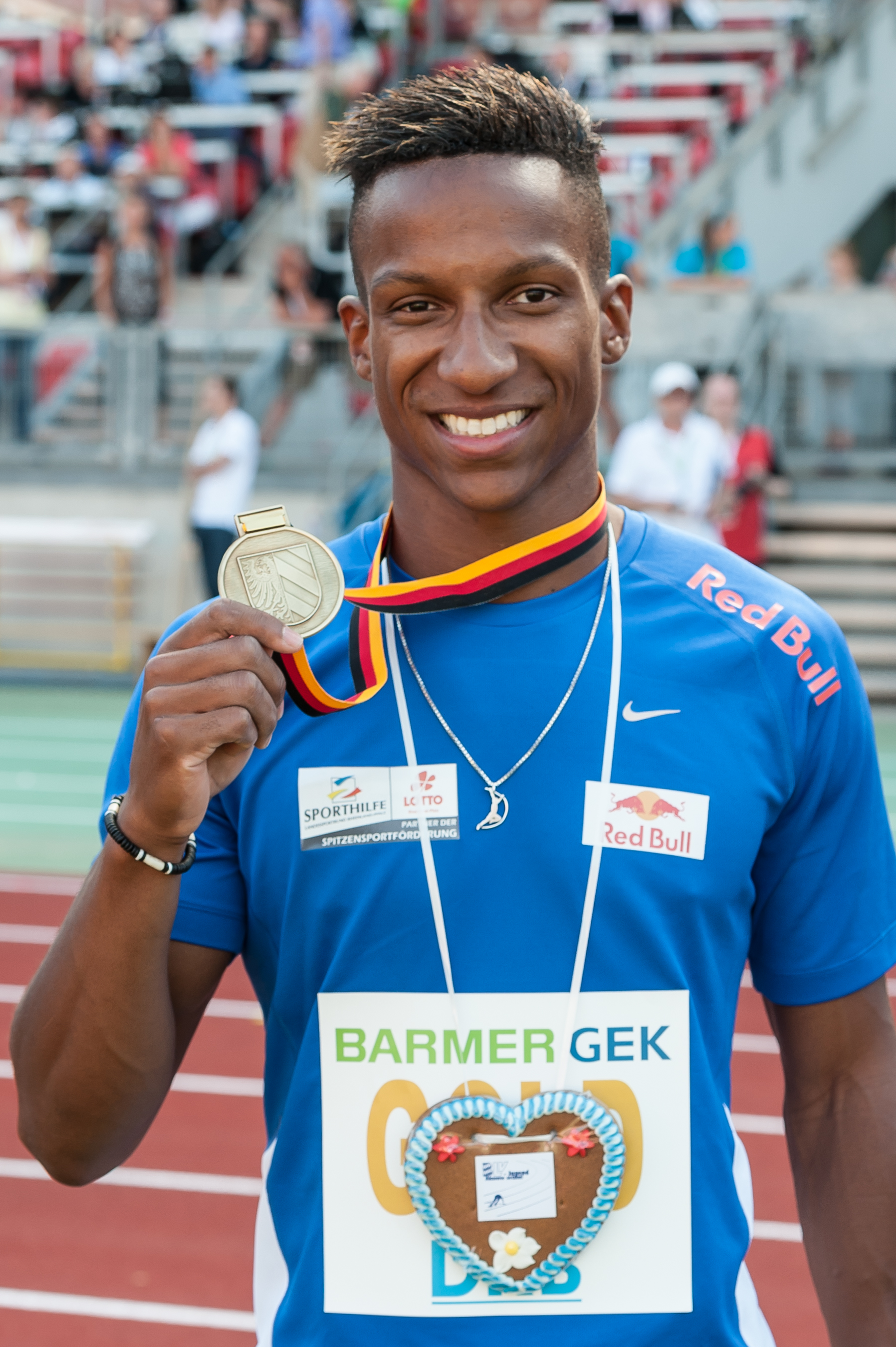 Deutsche Leichtathletik-Meisterschaften 2015: Männer Stabhochsprung - Raphael Holzdeppe, LAZ Zweibrücken